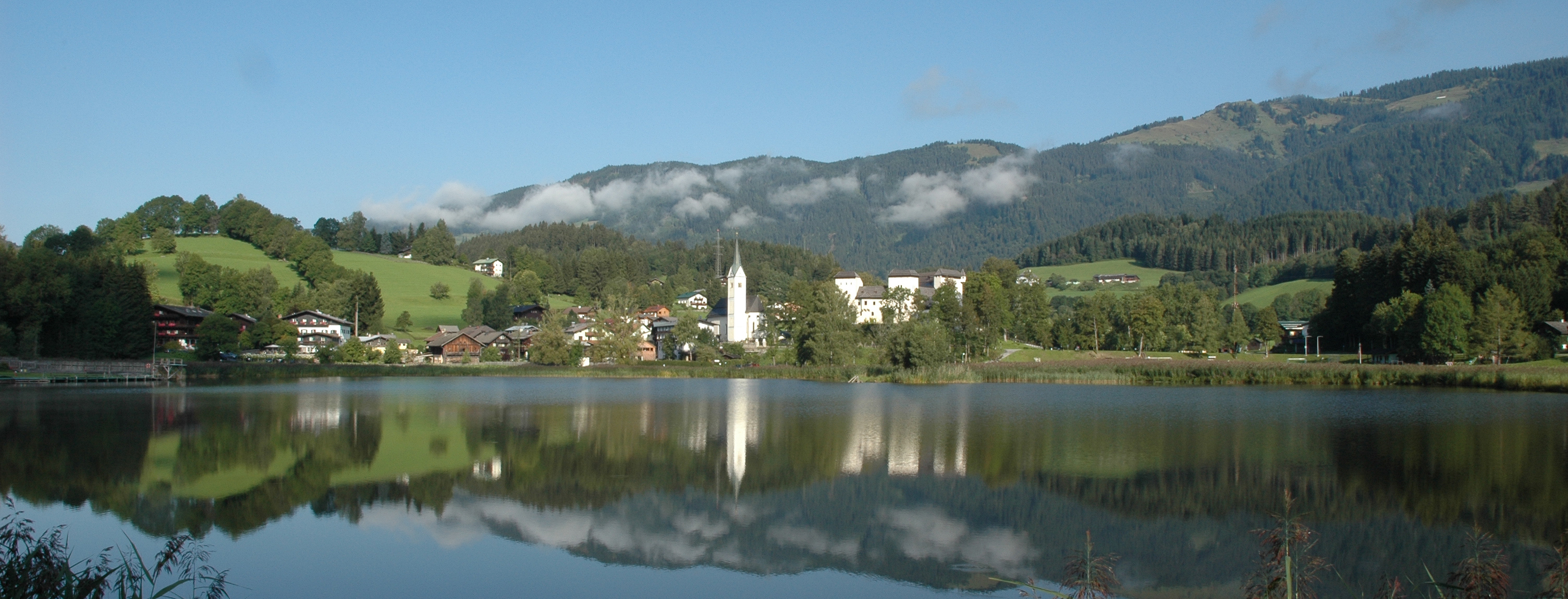 Ansicht von Goldegg im Pongau. Im Vordergrund der nur 5 ha große Goldegger See.